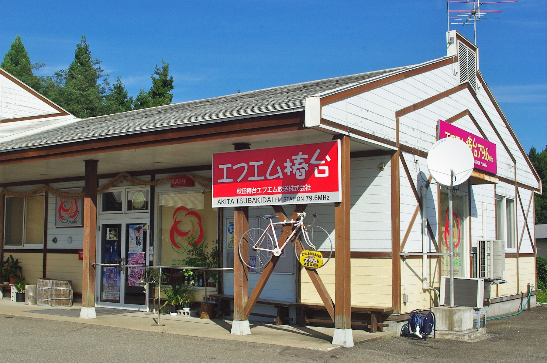 秋田椿台エフエム放送株式会社本社